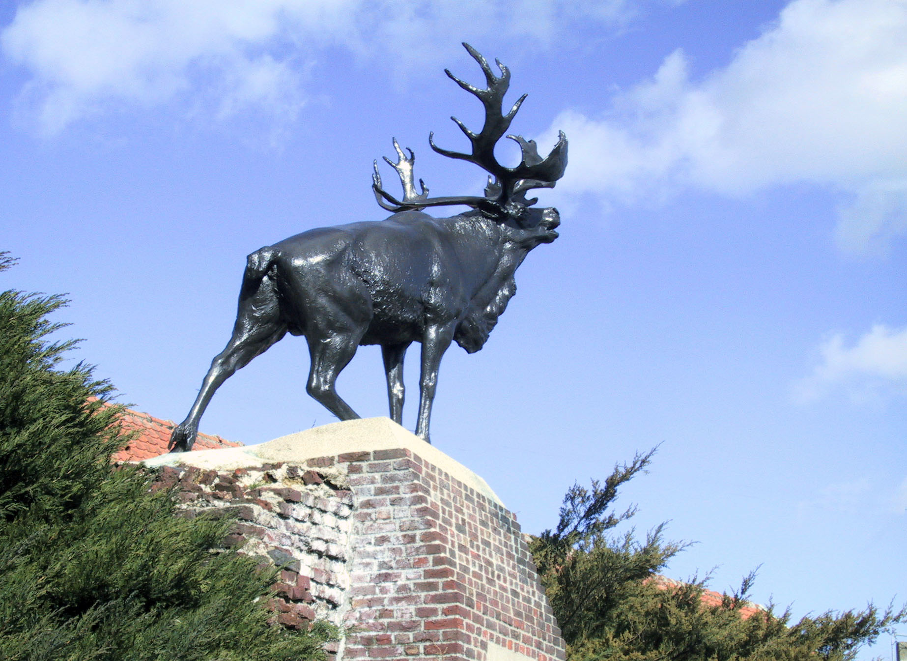 le caribou de monchy le preux